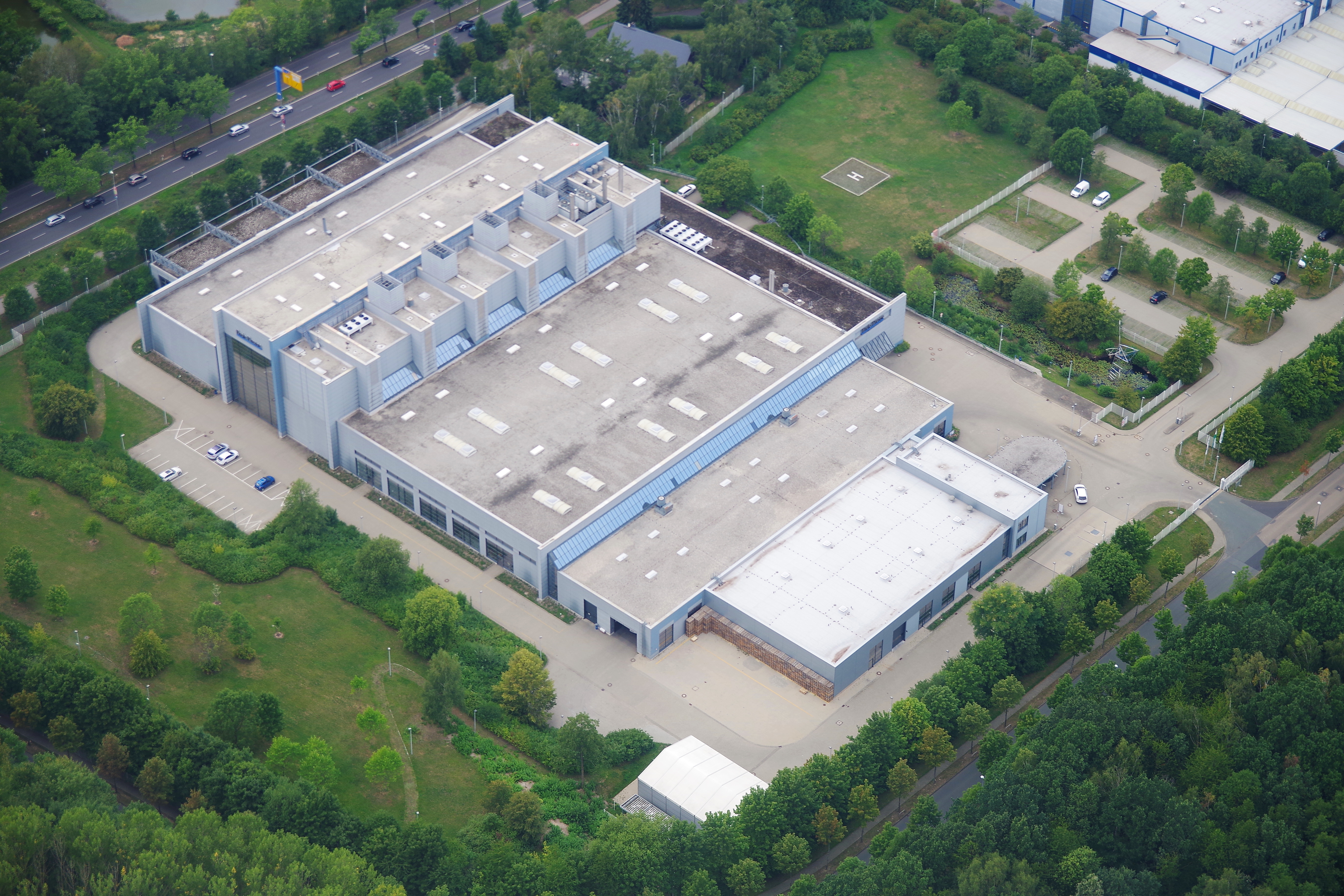 Druckerei und der CVD Mediengruppe (Freie Presse)